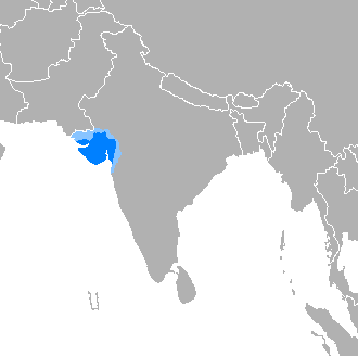 Donde es mayoritario Donde es minoritario